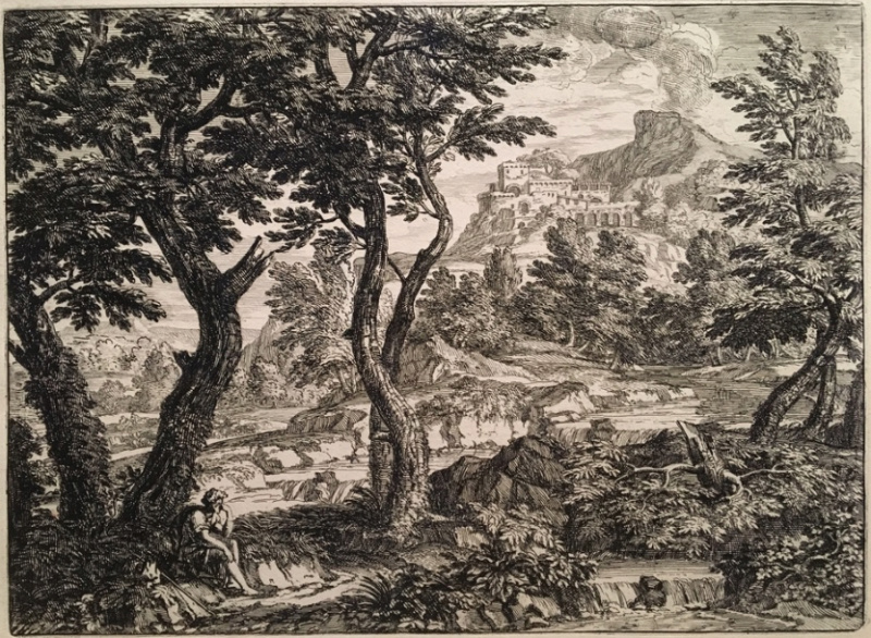 Georges Focus, Eau forte, Vue d'Italie